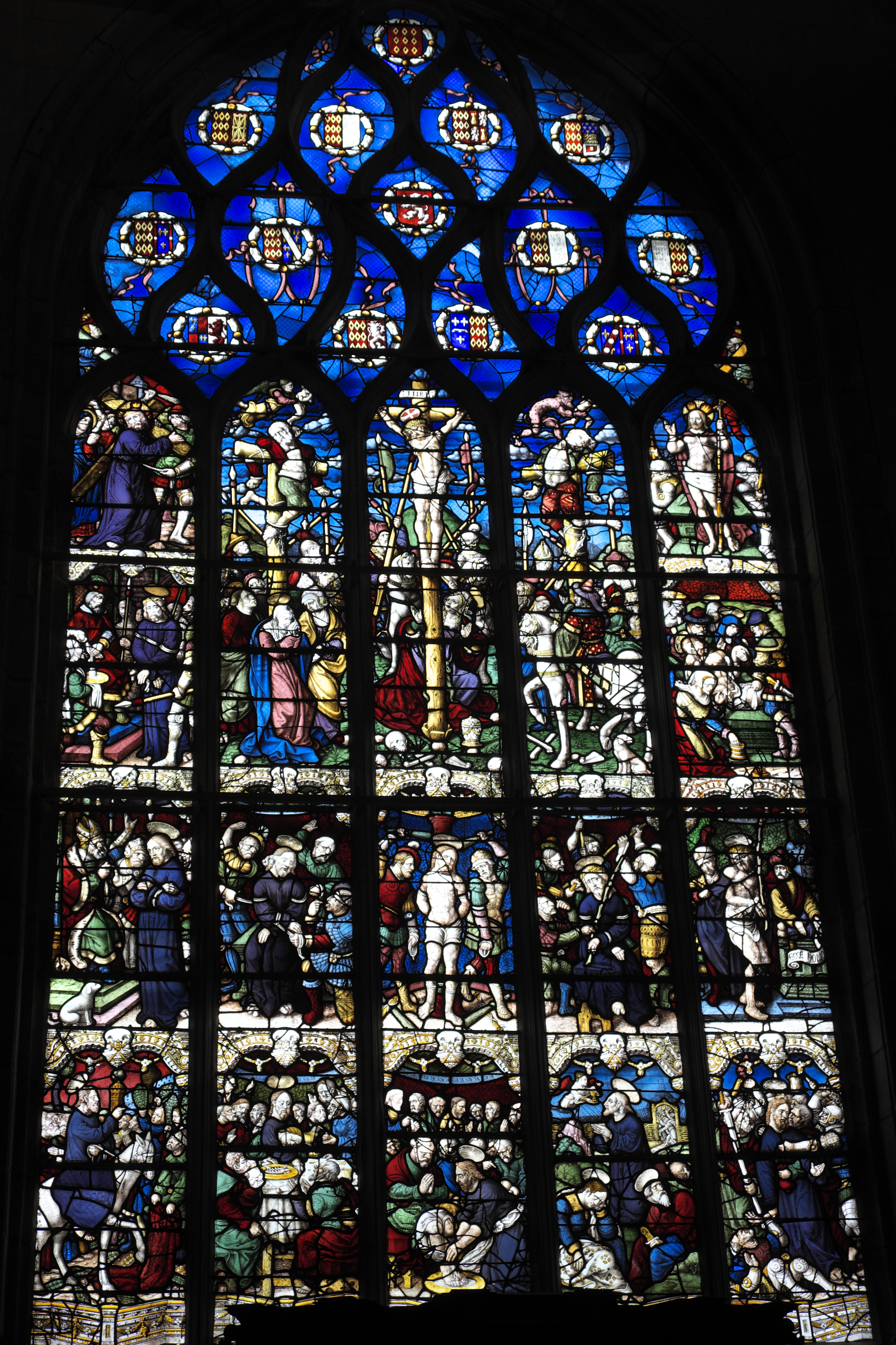 Passionsfenster in der katholischen Pfarrkirche Saint-Yves in La Roche-Maurice im Département Finistère (Region Bretagne/Frankreich), von 1539